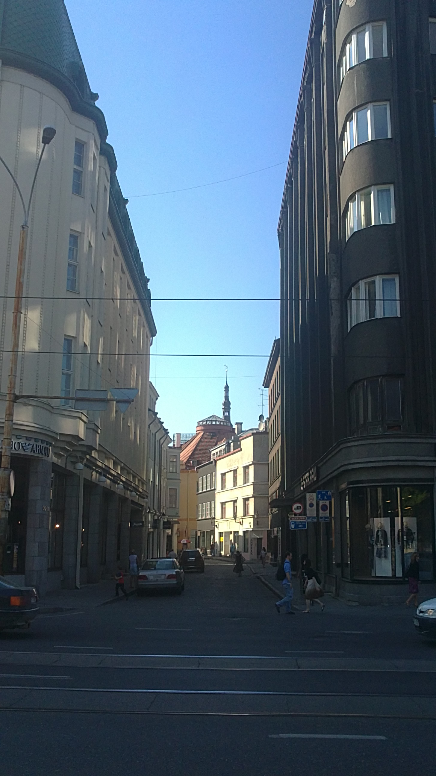 Tallinna vanalinna Väike-Karja tänava ja Pärnu maantee ristmik, vaade Pärnu maanteelt